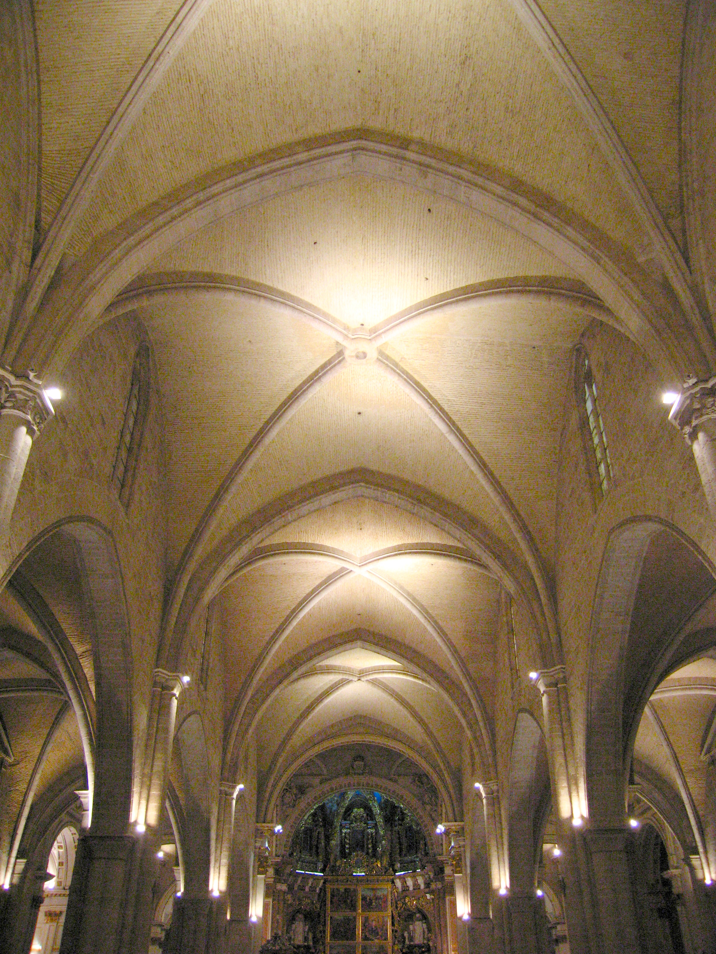 Nau Central de la Seu de València